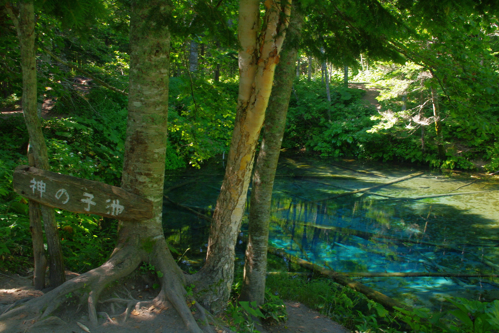 Kami-no-ko_ike(神の子池), Kiyosato town Hokkaido Japan